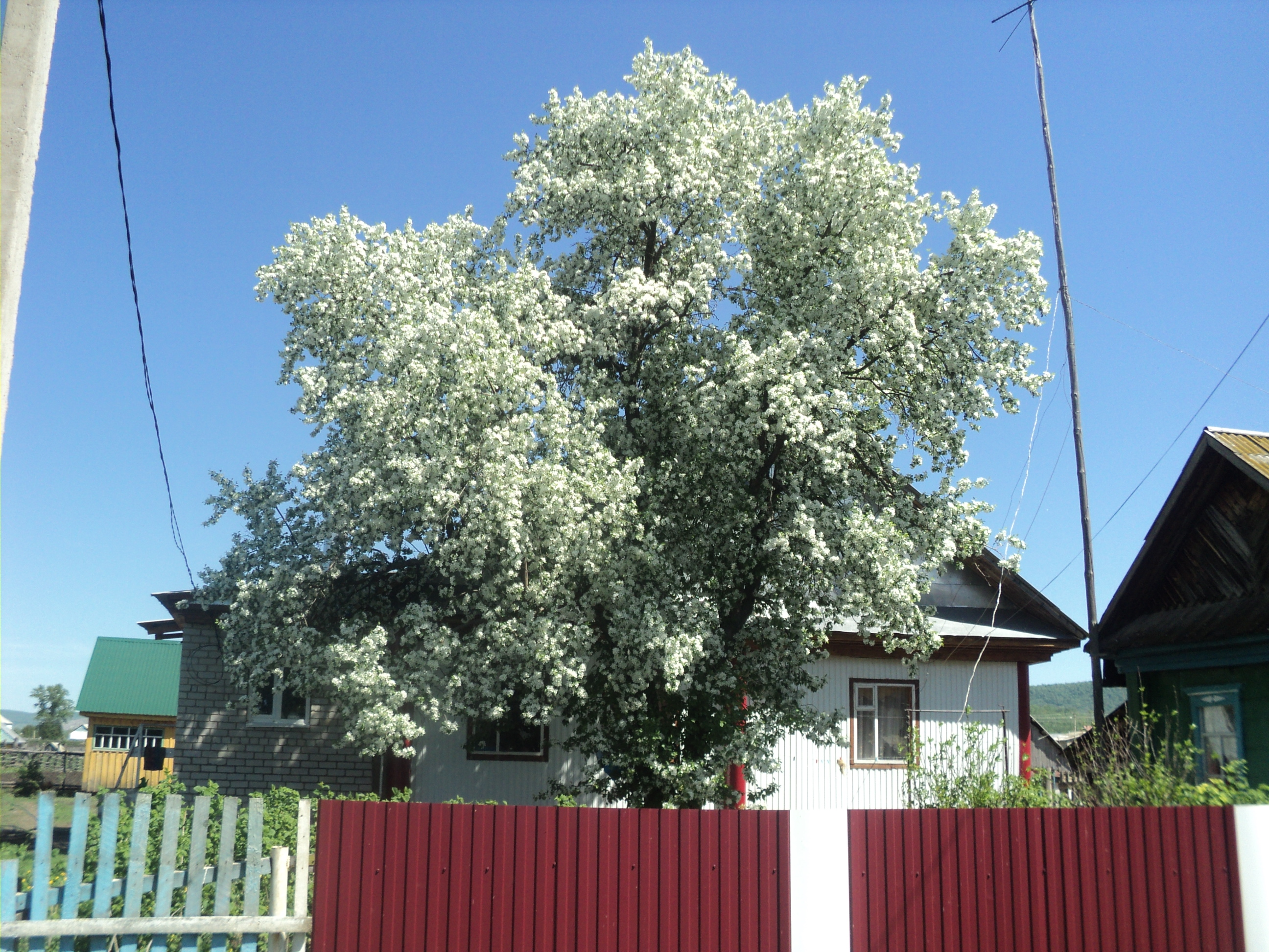 Башҡортса: Партизан урамы